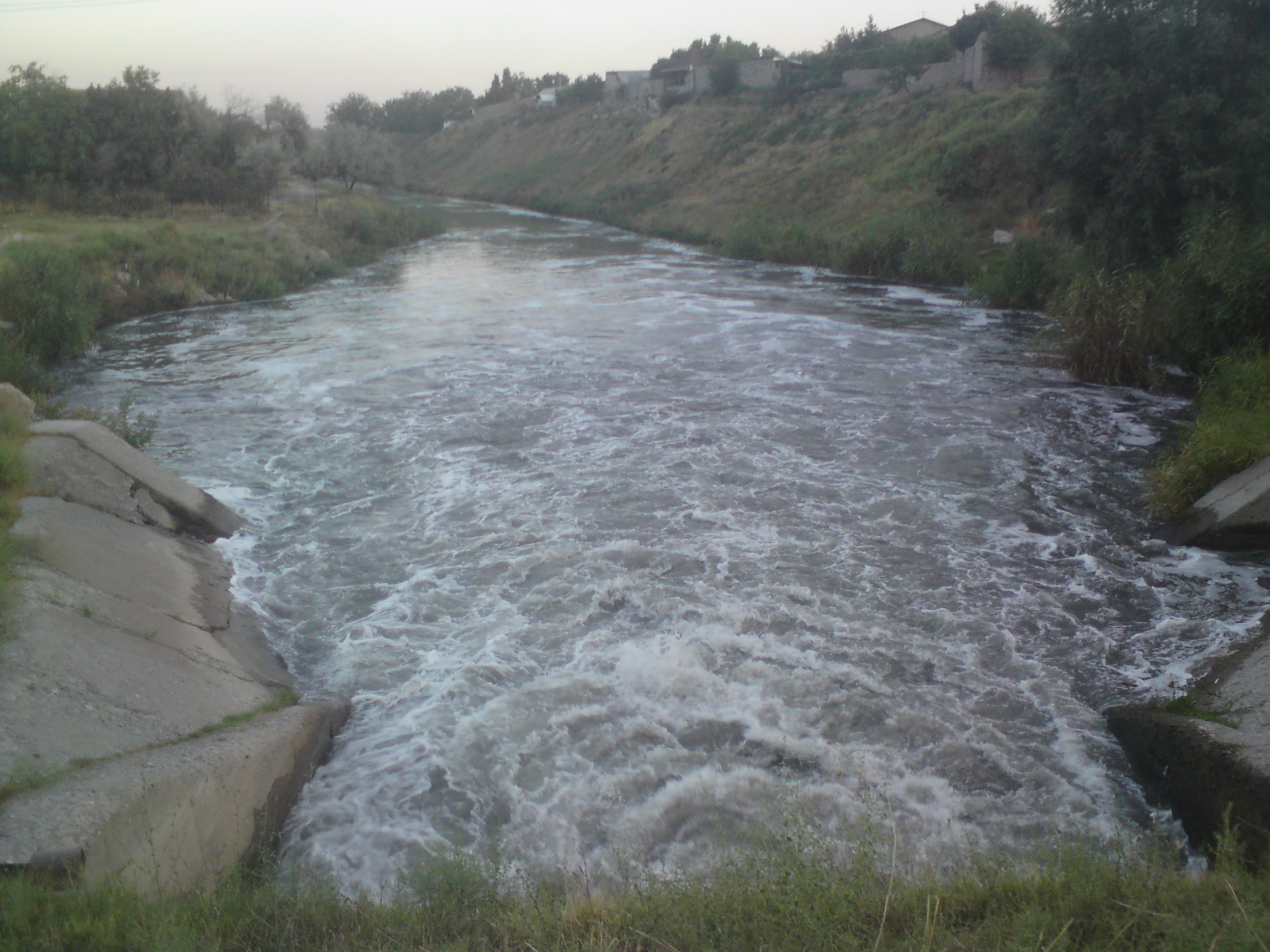 Северный Ташкентский канал за истоком, Ташкентский вилоят, близ Карасупской птицефабрики